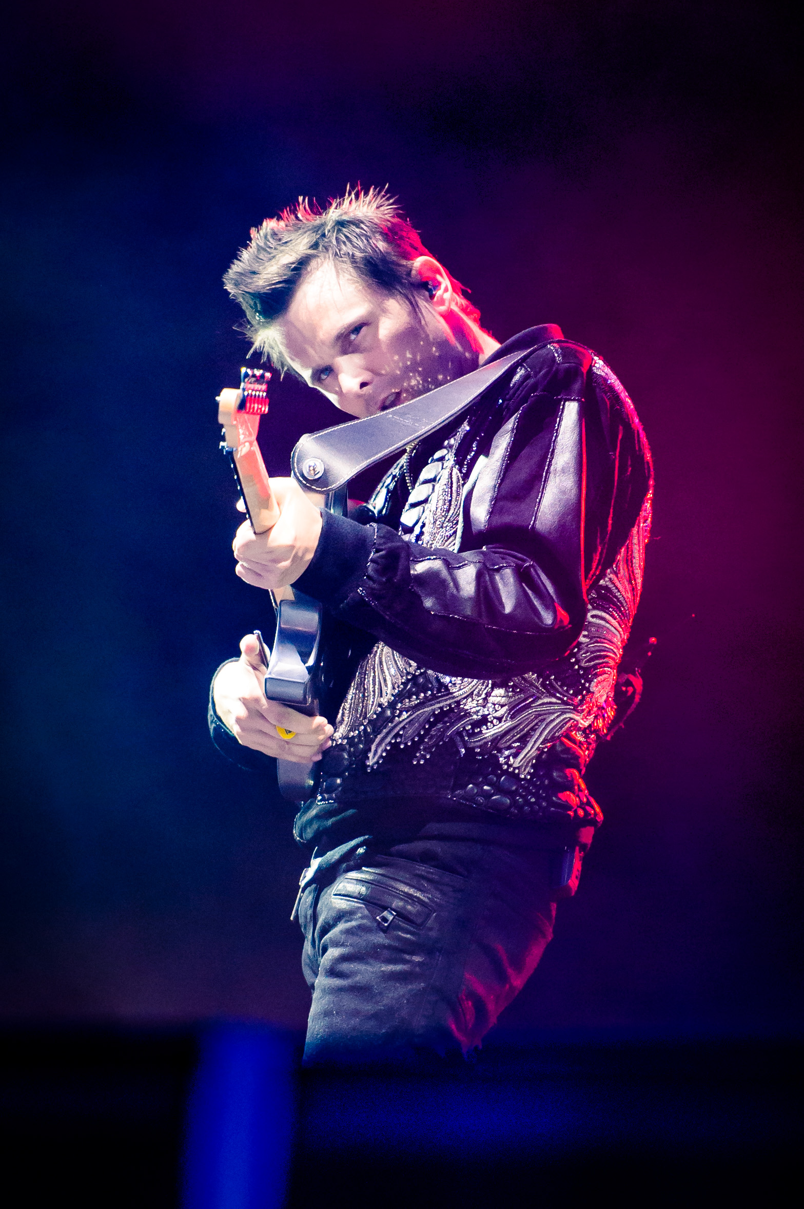 'Rock im Park 2018; Zeppelinfeld Nürnberg': 'Muse'